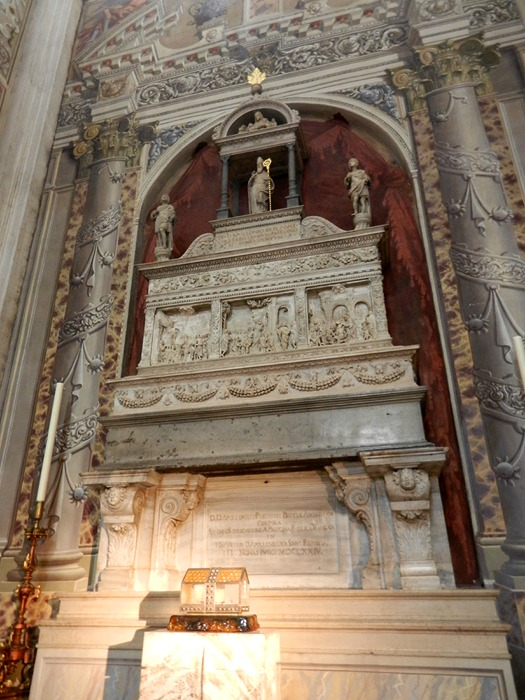 Brescia - Arca dei Ss. Apollonio e Filastrio, opera rinascimentale del 1510, all'interno del Duomo